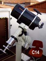 Das C14-Reflektor-Teleskop (Hersteller Celestron) der Sternwarte Heilbronn